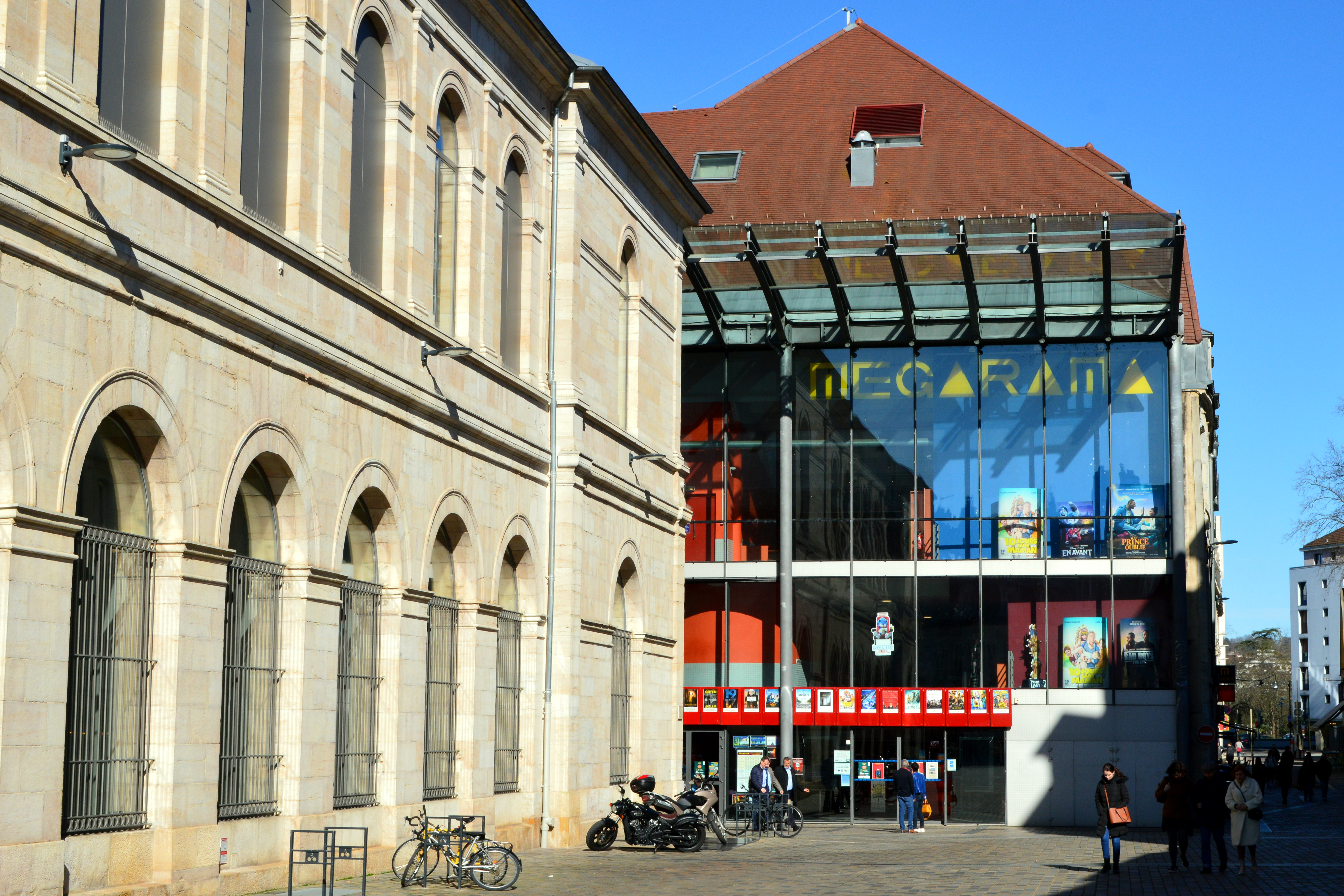 Le cinéma Mégarama Beaux-Arts de Besançon, situé derrière le musée des Beaux-Arts et d'Archéologie, dans le centre-ville.